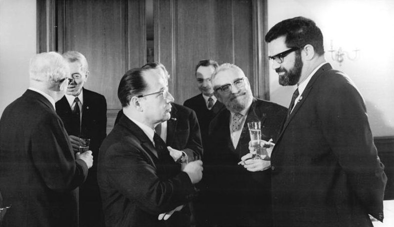 Zentralbild Franke-25.3.70 Berlin: 20 Jahre Akademie der Künste- Akademiepräsident Konrad Wolf (rechts) nahm am 25.3.70 bei einer Gratulationscour Glückwünsche zum 20jährigen Bestehen der Deutschen Akademie der Künste entgegen. Erste Gratulanten waren der Minister für Kultur der DDR, Klaus Gysi (l.) und der Präsident des Verbandes der Theaterschaffenden, Prof. Wolfgang Heinz (Mitte).